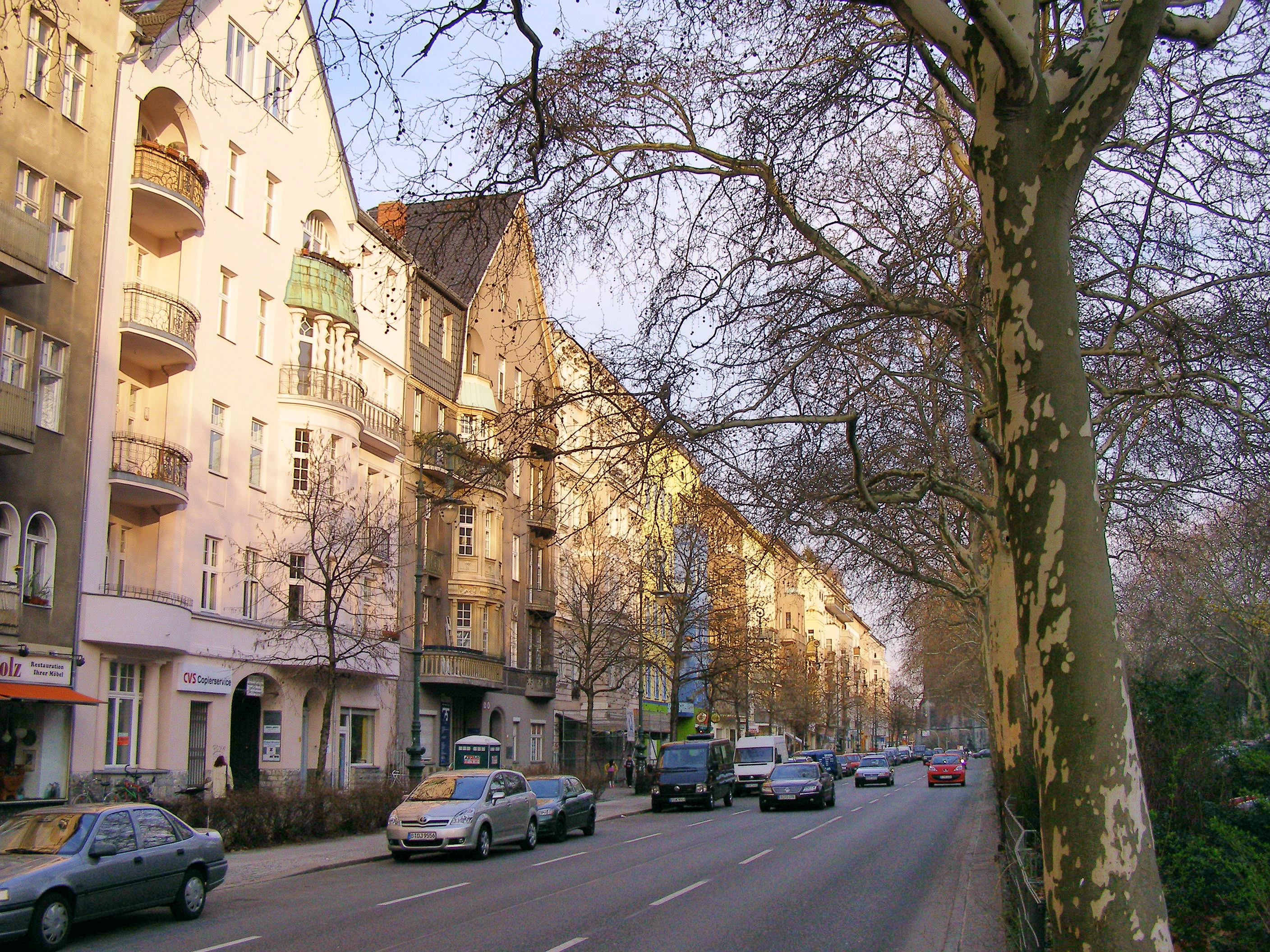 Gneisenaustraße, Berlin (Kreuzberg)